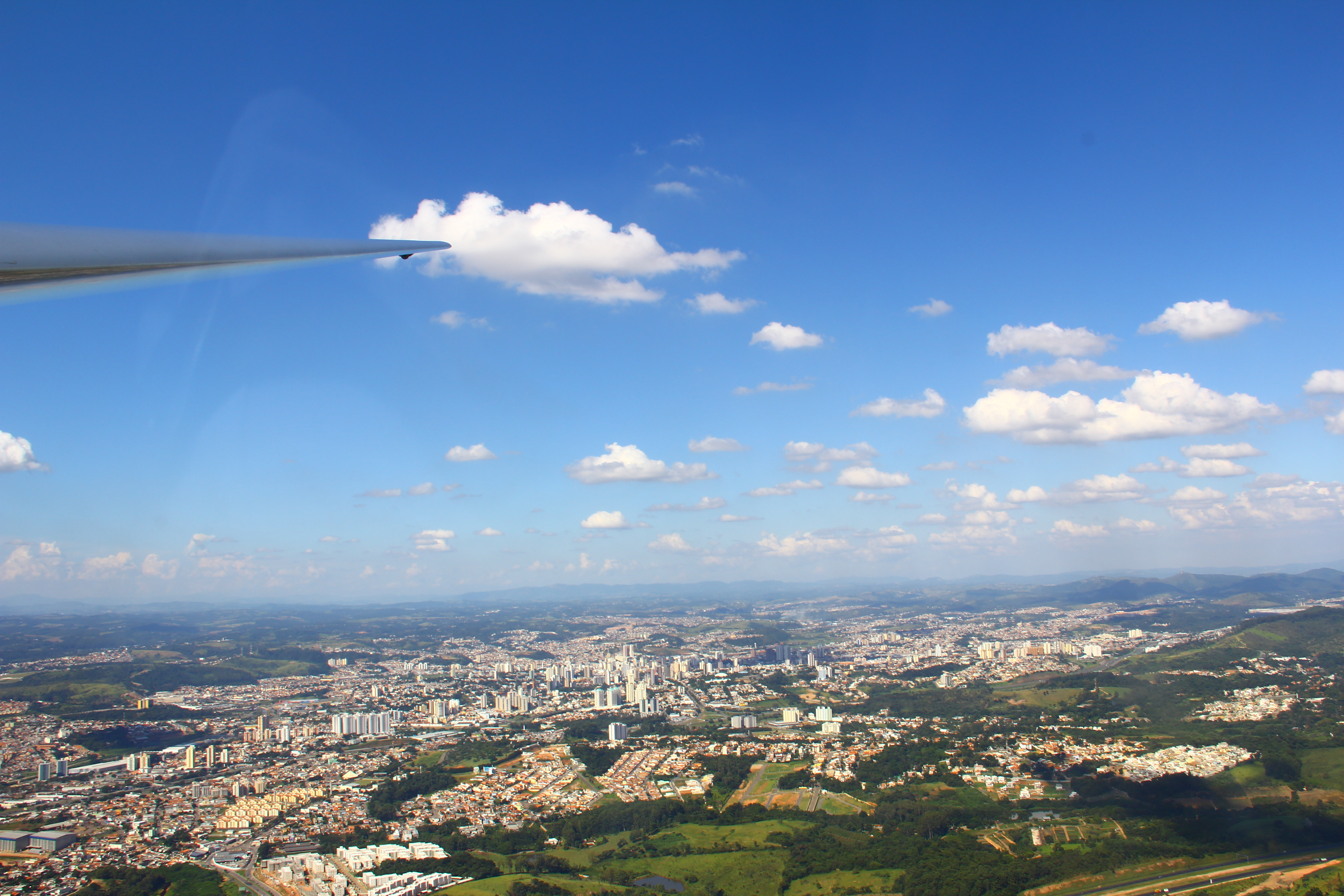 Voo a vela / Planadores no Aeroporto Estadual de Jundiaí / Comandante Rolim Adolfo Amaro